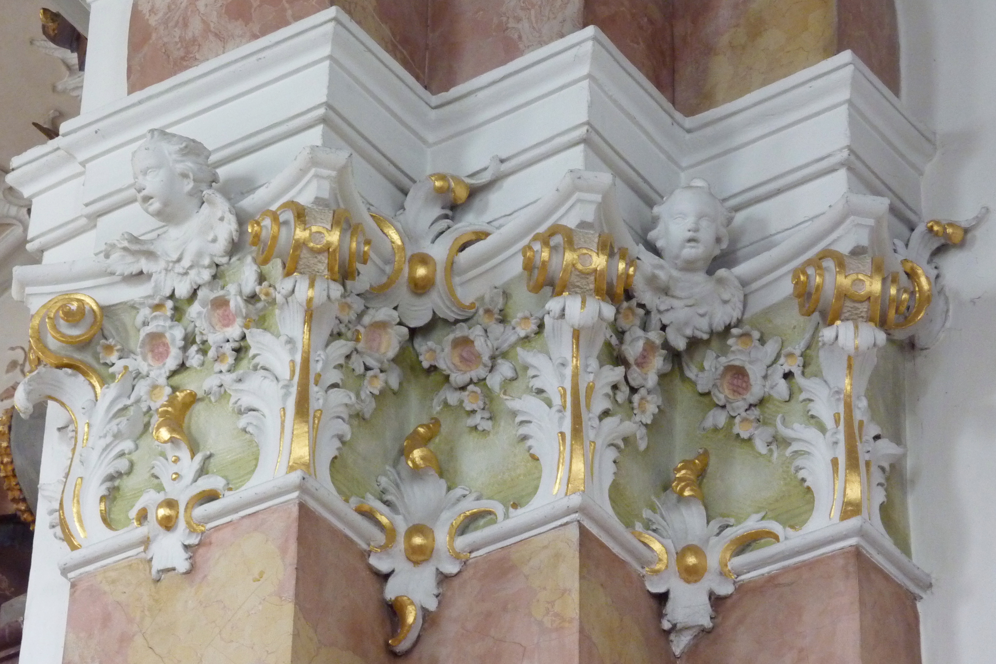 Katholische Pfarrkirche St. Vitus in Donaualtheim (Dillingen an der Donau), Kapitell mit Engelskopf, Stuck von Christian Greinwald